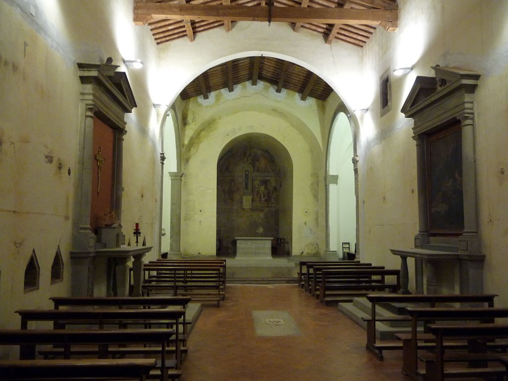 Montelupo Fiorentino (FI - Italia) - Prioria di San Lorenzo